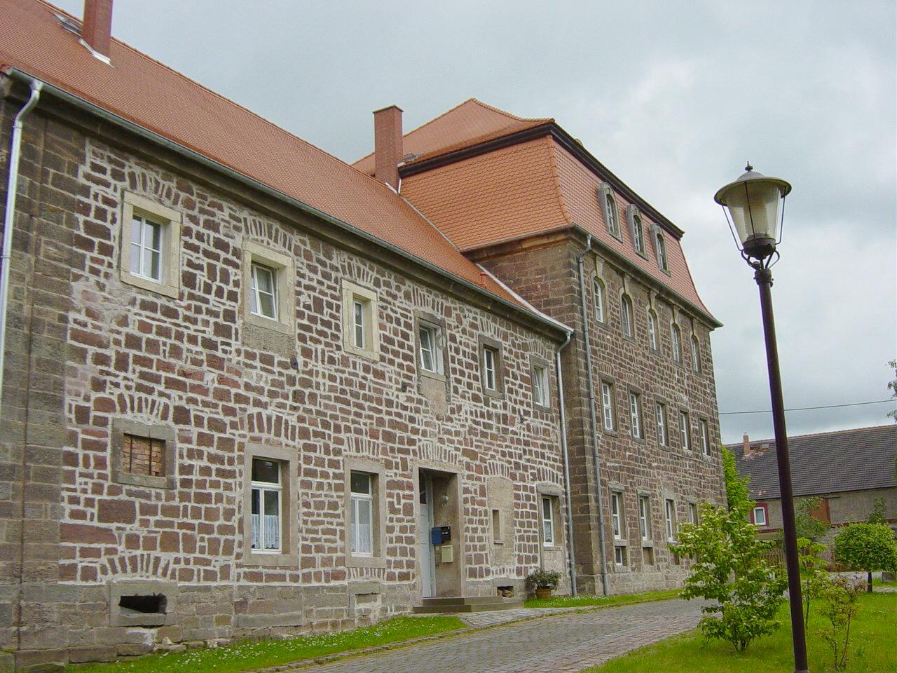 Rittergut Kirschscheidungen